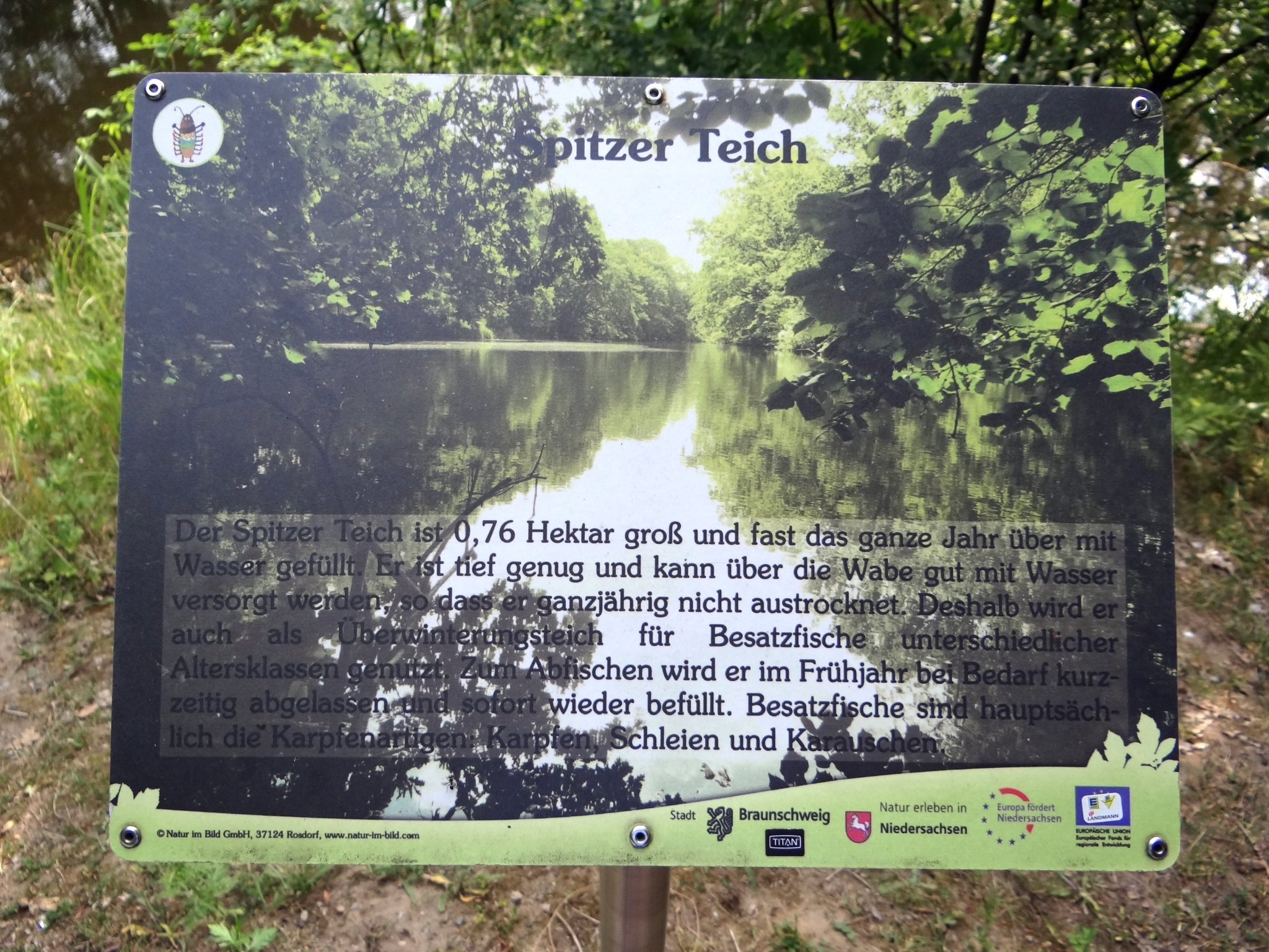 Informationstafel von Natur im Bild GmbH am Spitzen Teich Riddagshausen